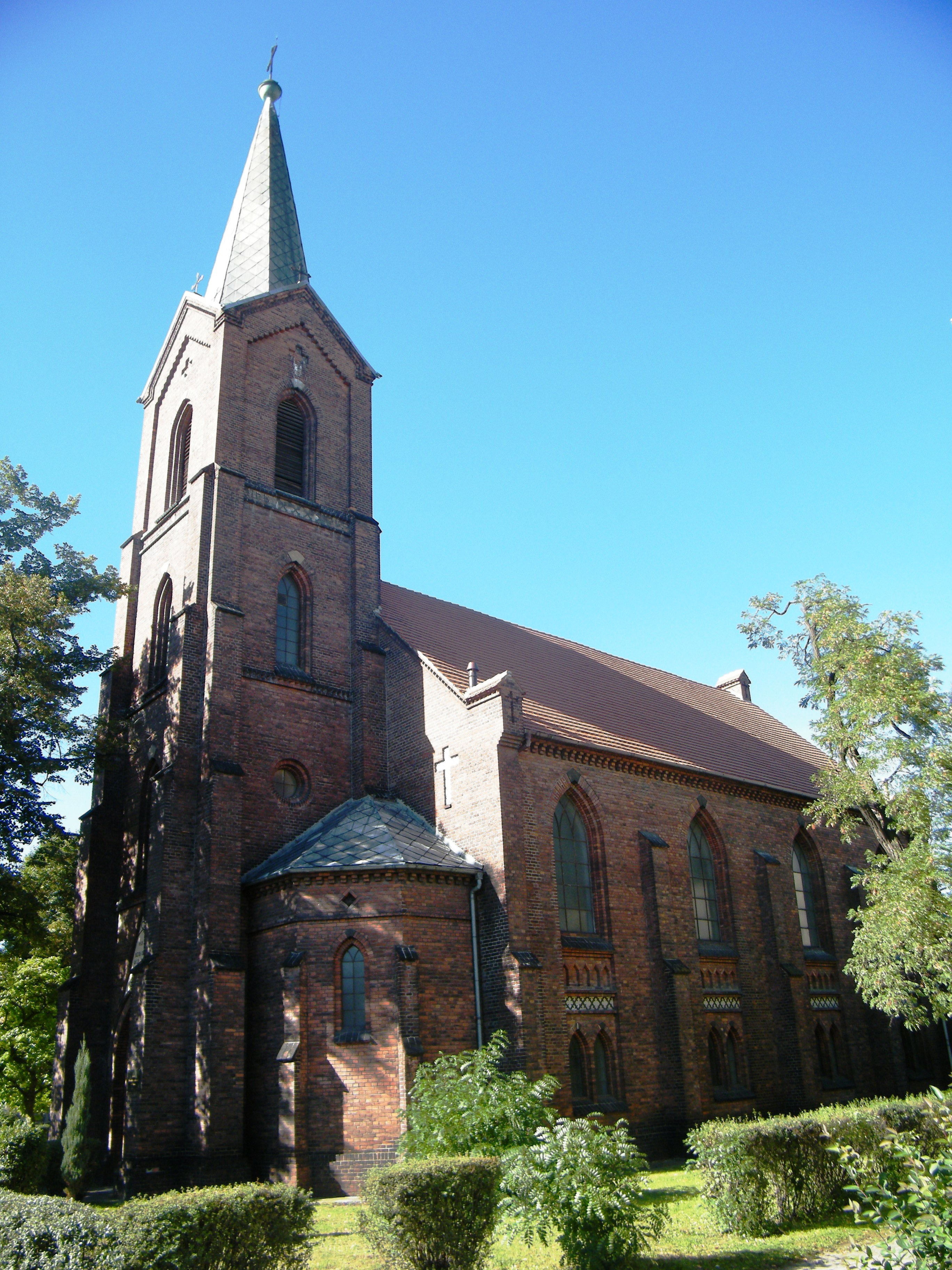 Brzeg, ul. Łokietka 9 - kościół ewangelicko-augsburski (zabytek nr 2105/84 z 30.11.1984)